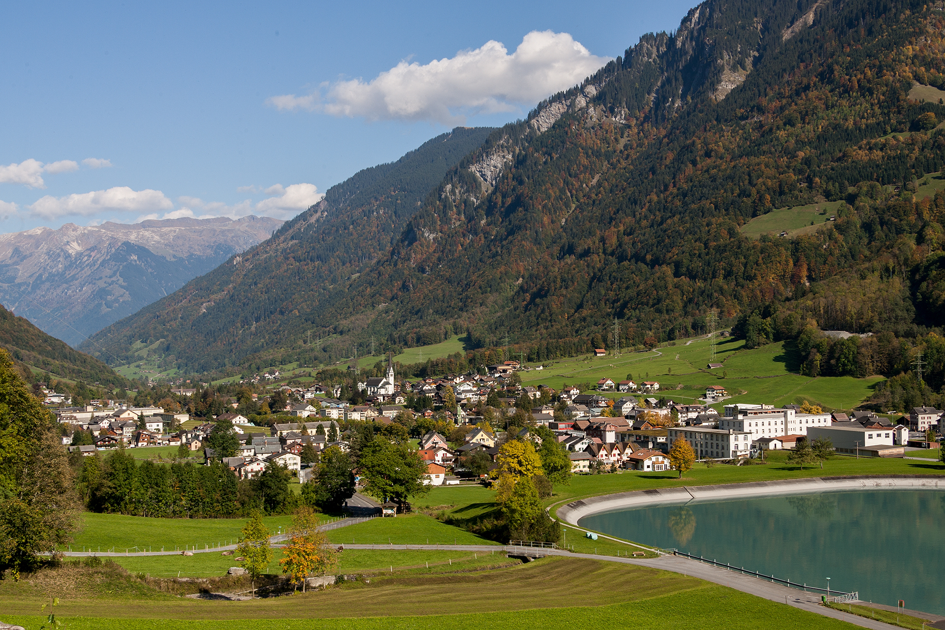 Linthal (GL)